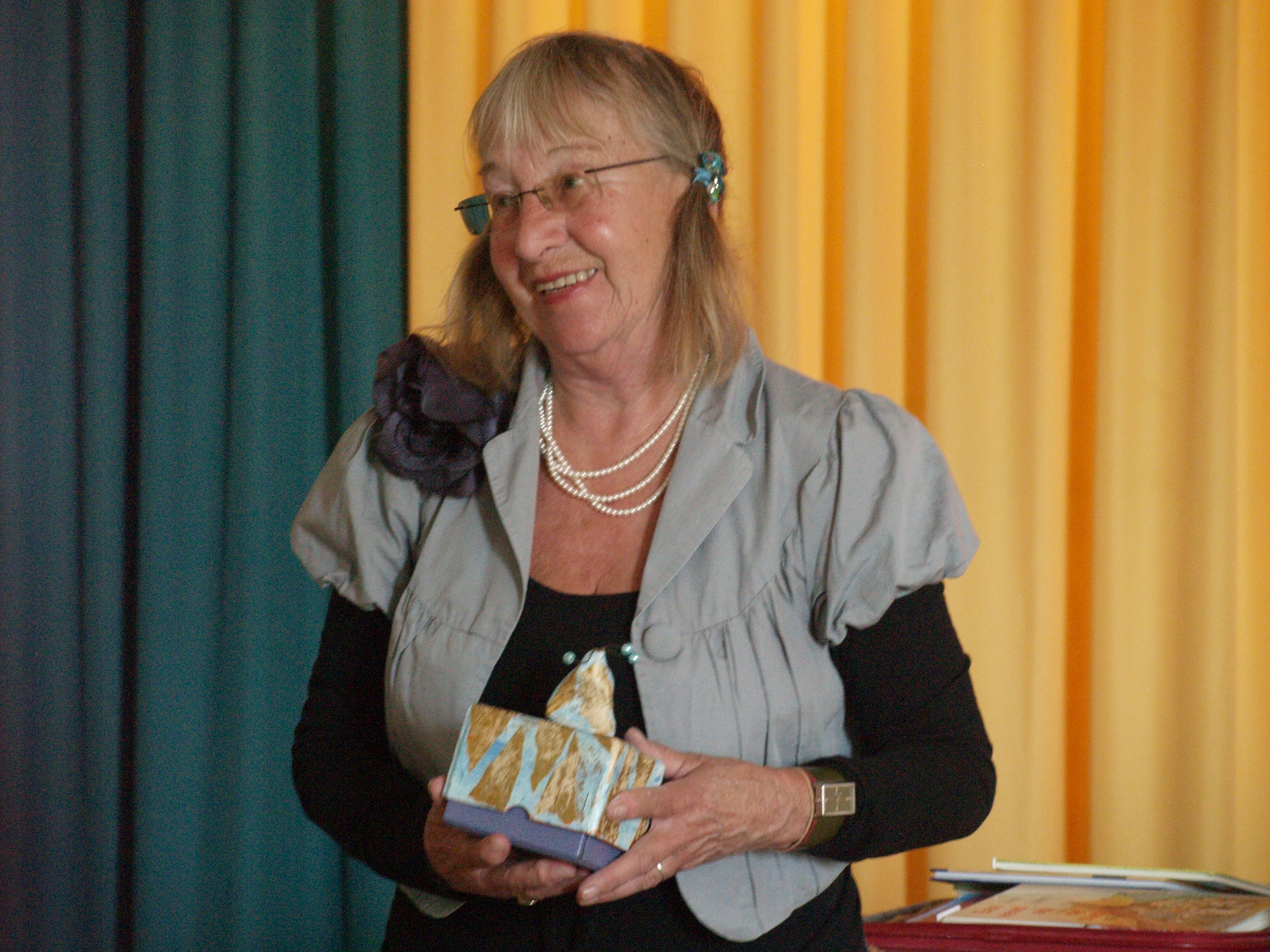 Anne Takens, Arembergschool, Zwartsluis (2010)